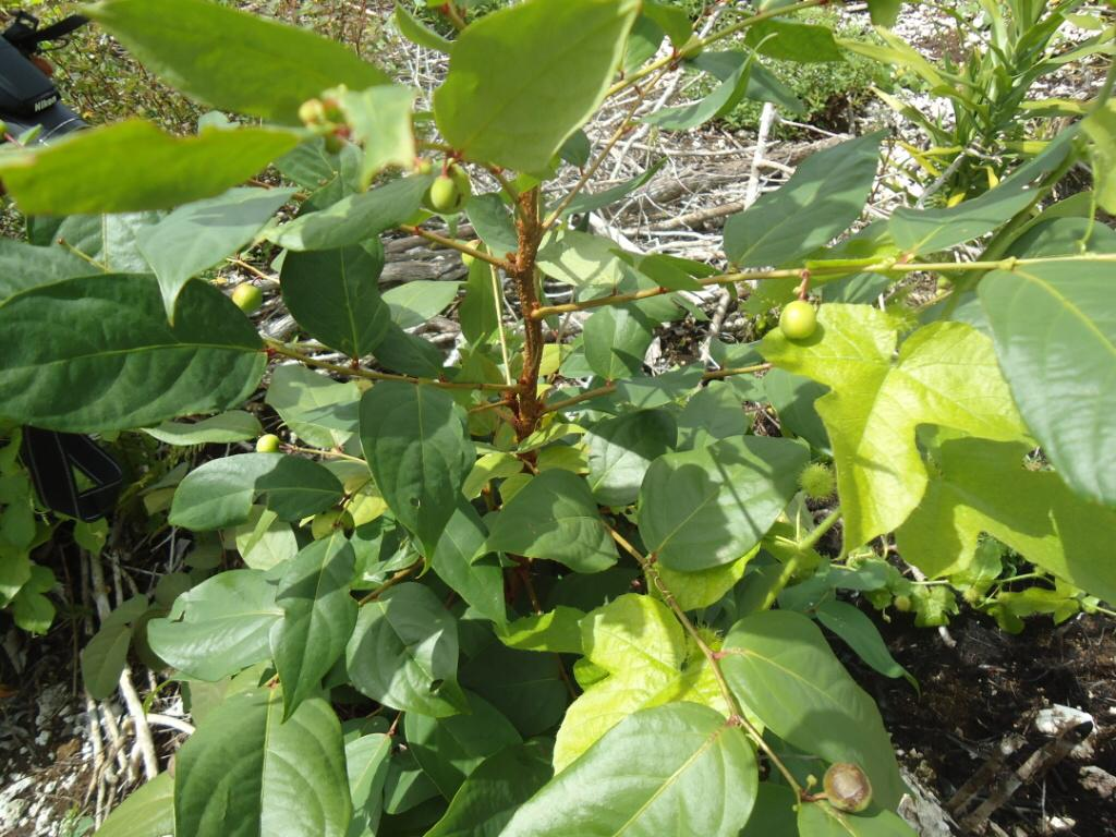 daun sampare